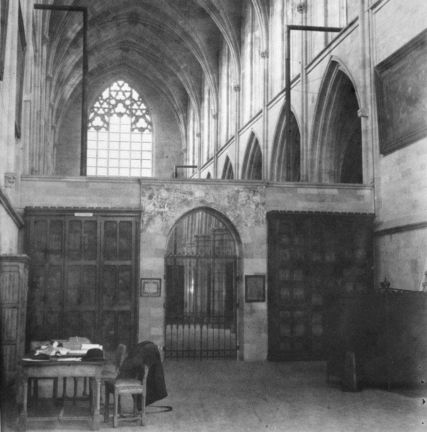 Voormalige Franciscanen Kerk: inwendig naar het westen